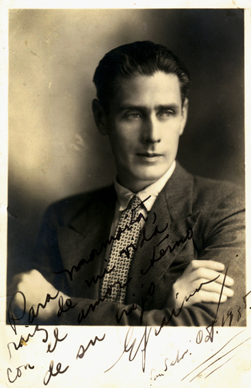 Fotografía del escritor salvadoreño Salvador Salazar Arrué (1899-1975) en su juventud. Retrato firmado para su madre.